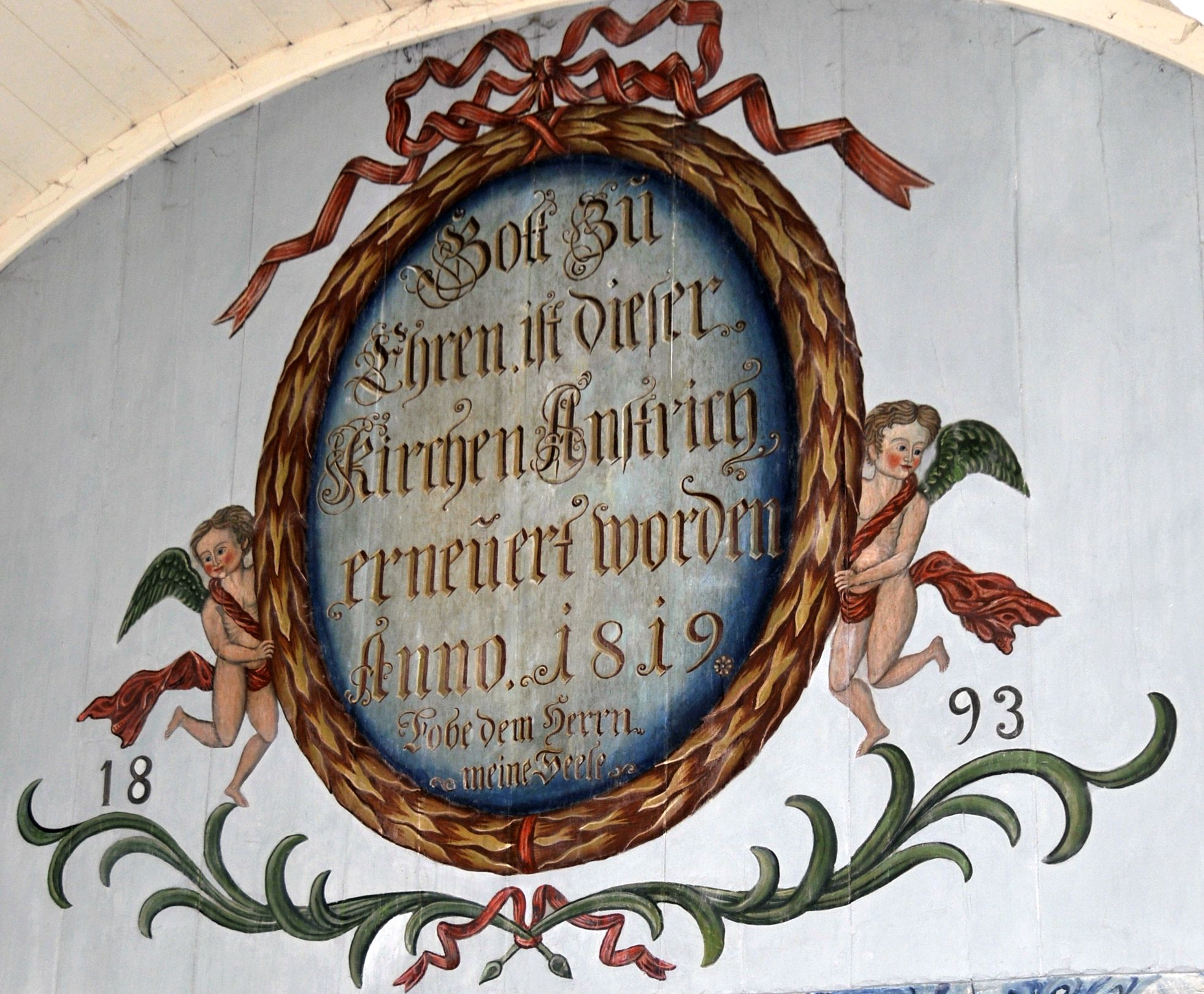 Wandgemälde in der Kirche Röhrensee